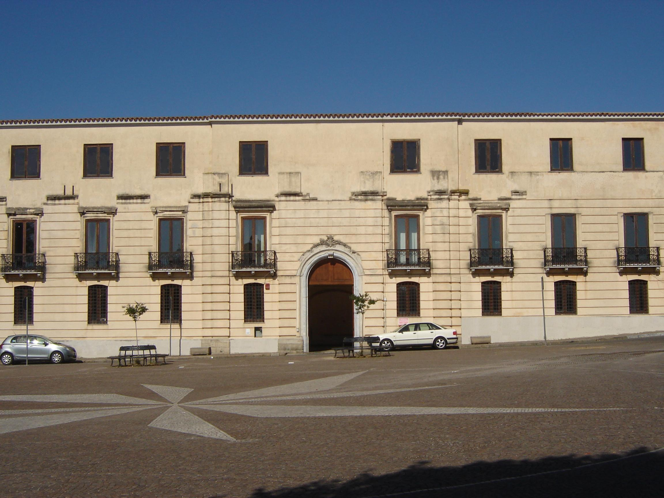 Palazzo Grillo (Palazzaccio) sarà sede del Museo Civico